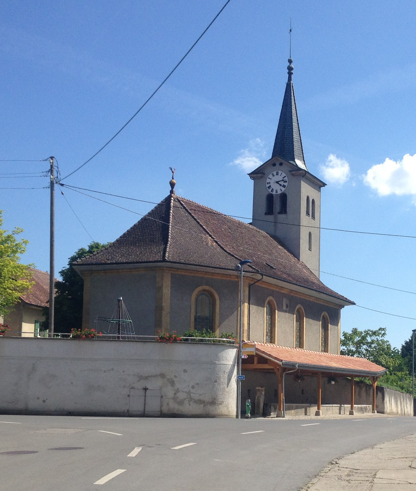 L'église de Suchy, dans le canton de Vaud en Suisse.